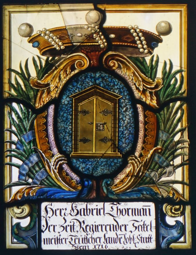 Kirche Seedorf bei Aarberg, Wappen Bern Stadt, Burckard Engel, Gabriel Thormann.